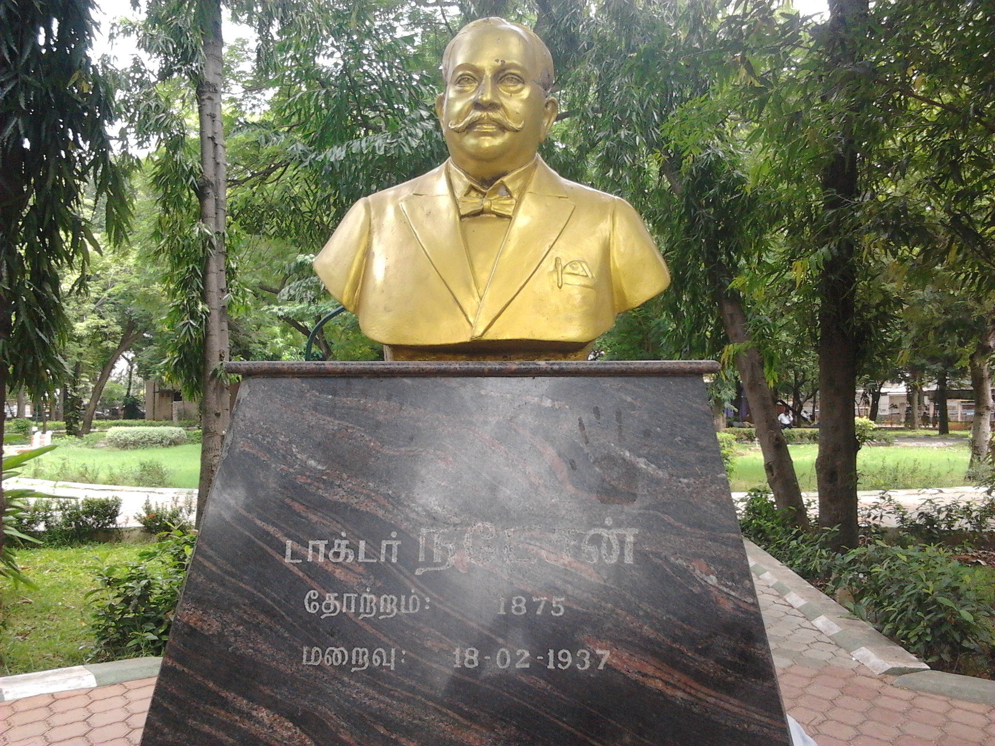 Dr Natesan statute in natesan park t nagar Chennai